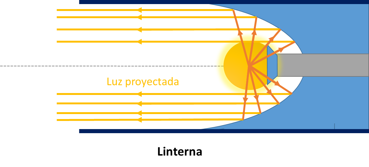 Principio del funcionamiento de una linterna